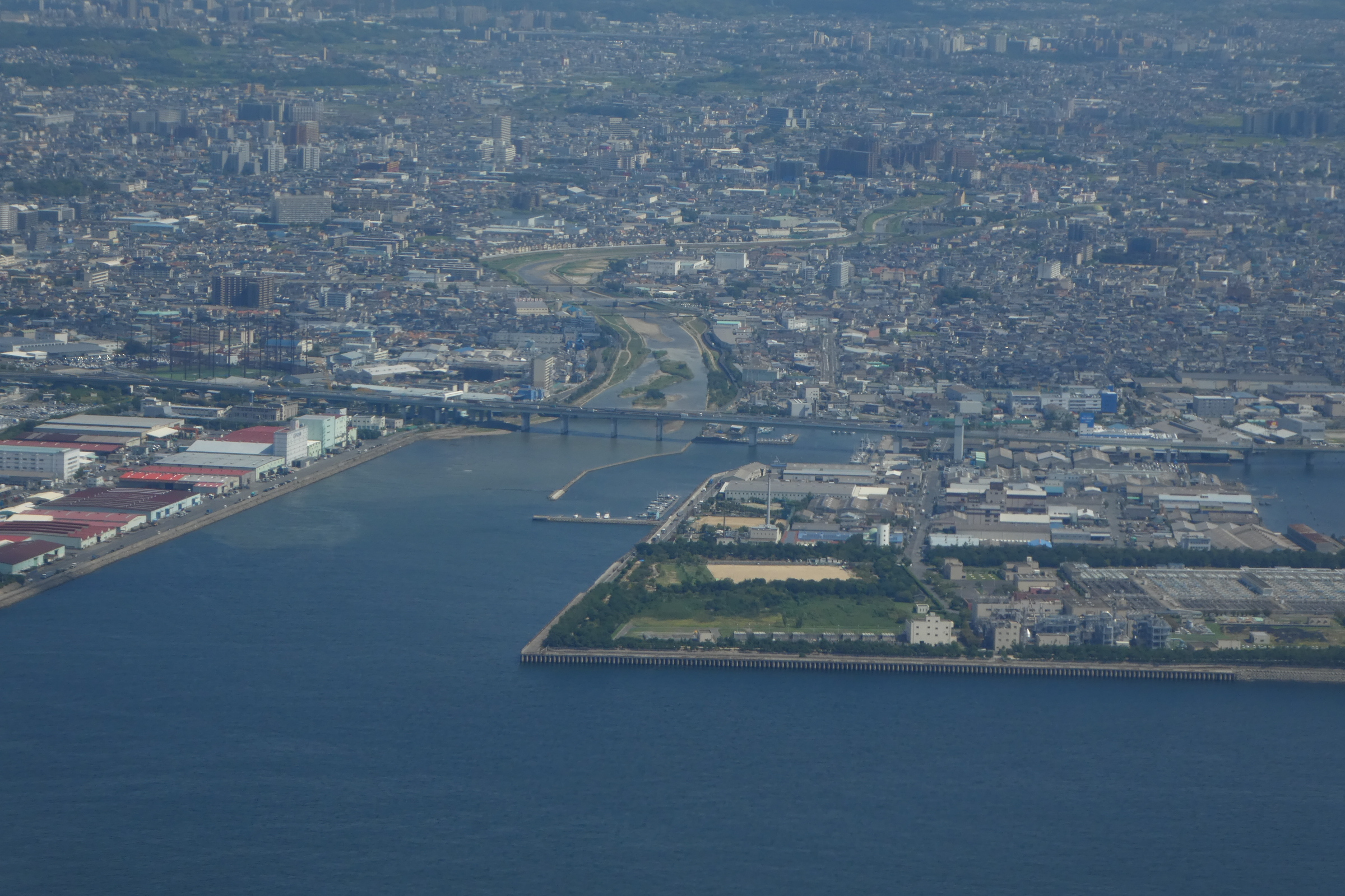 大津川（大阪府）の河口